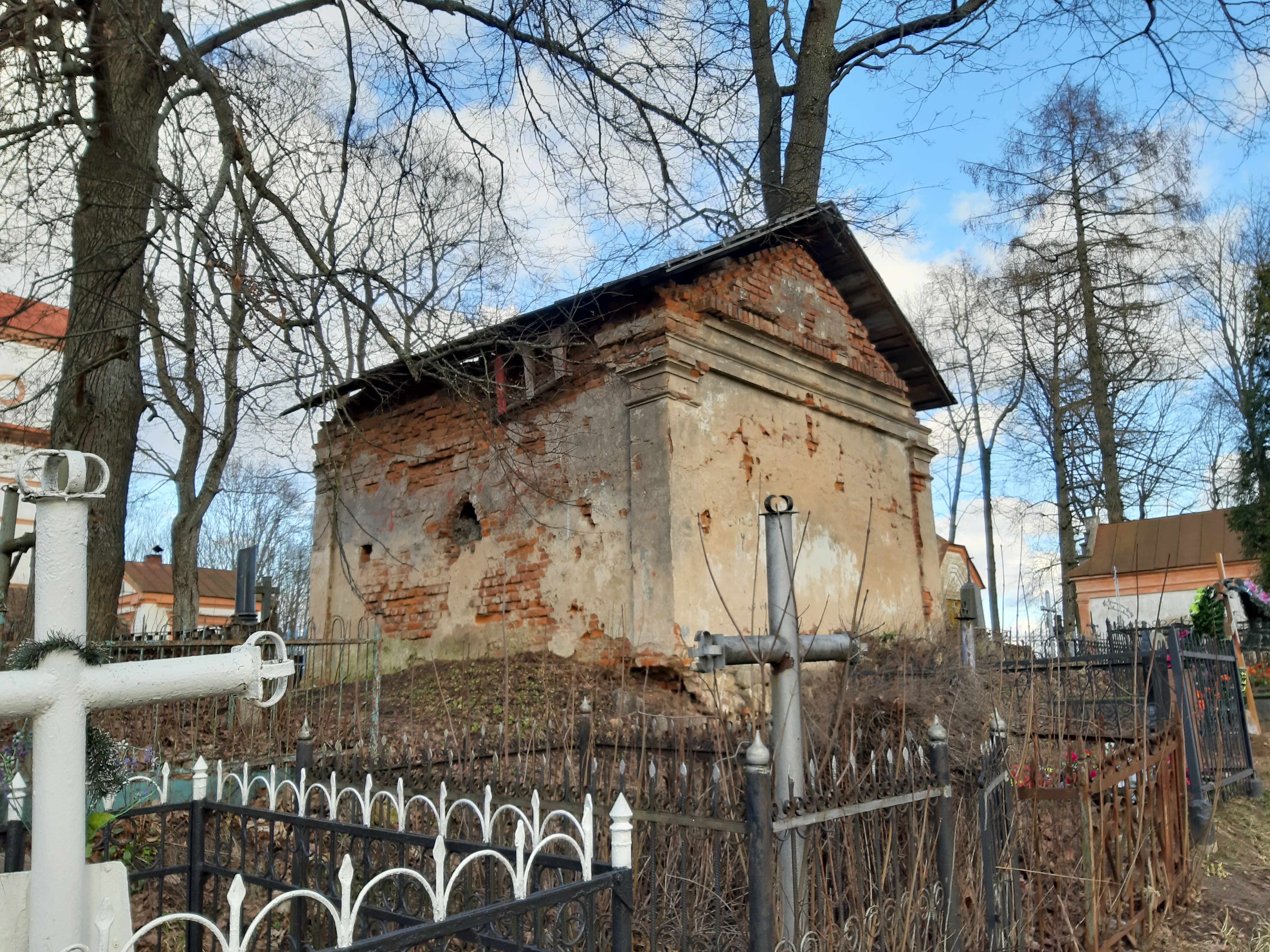 Мінск. Кальварыйскія могілкі. 2020